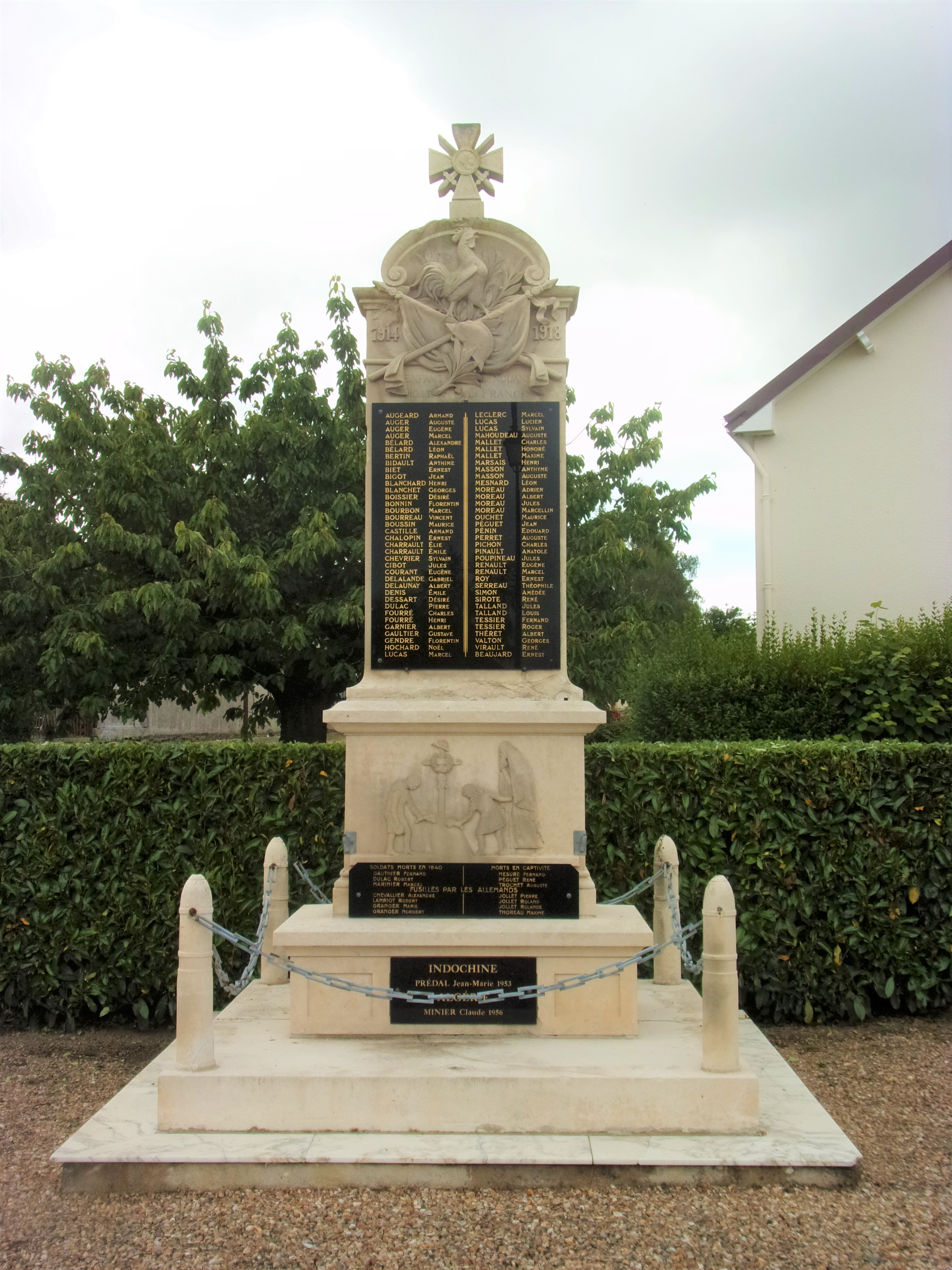 Monuments aux morts de Nouans-les-Fontaines